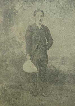 김옥균